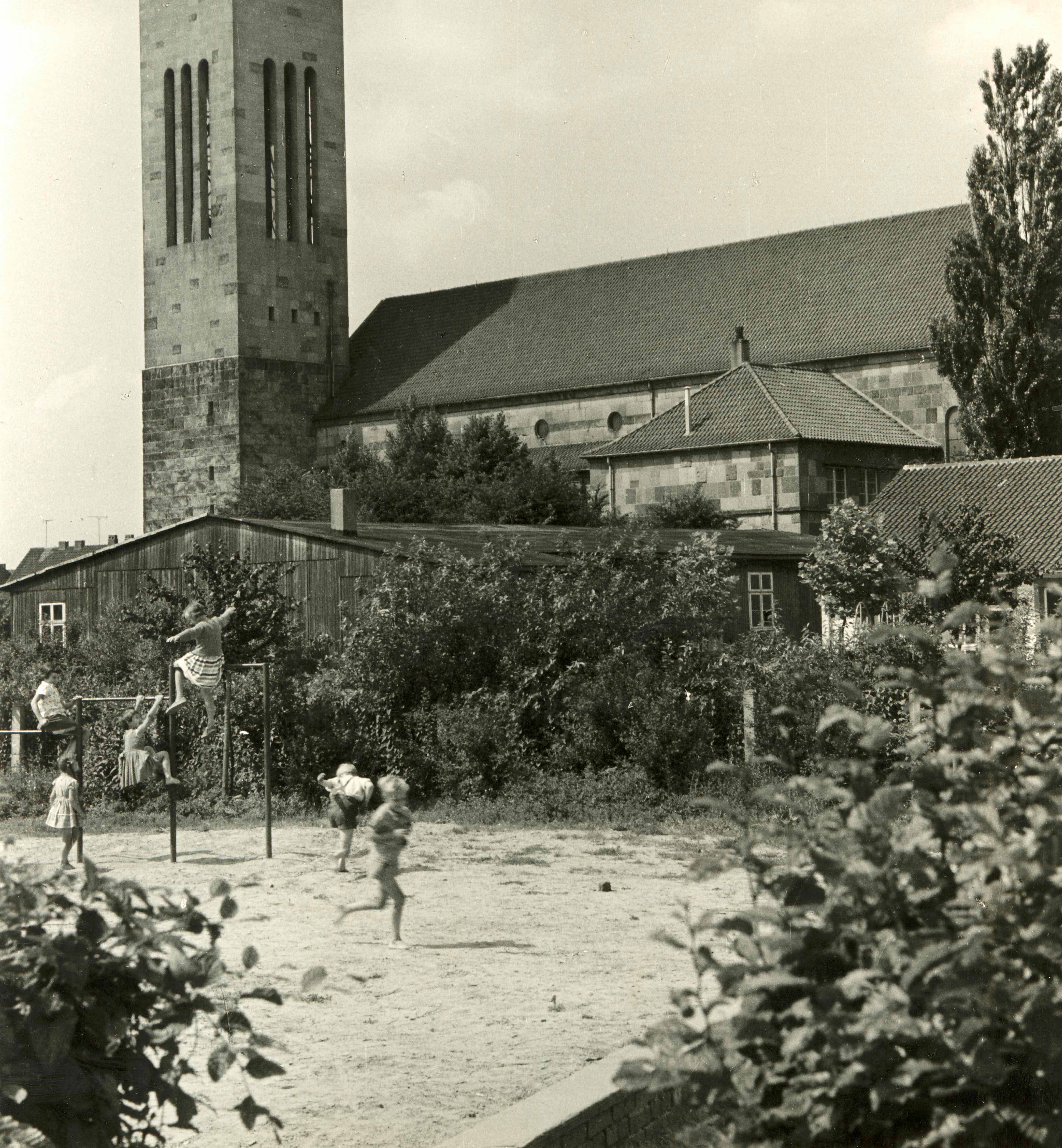 St. Elisabeth, Rheine - Baracke; Nachkriegszeit